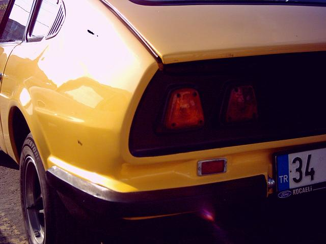 Anadol STC-16 stop, sinyal ve tampon